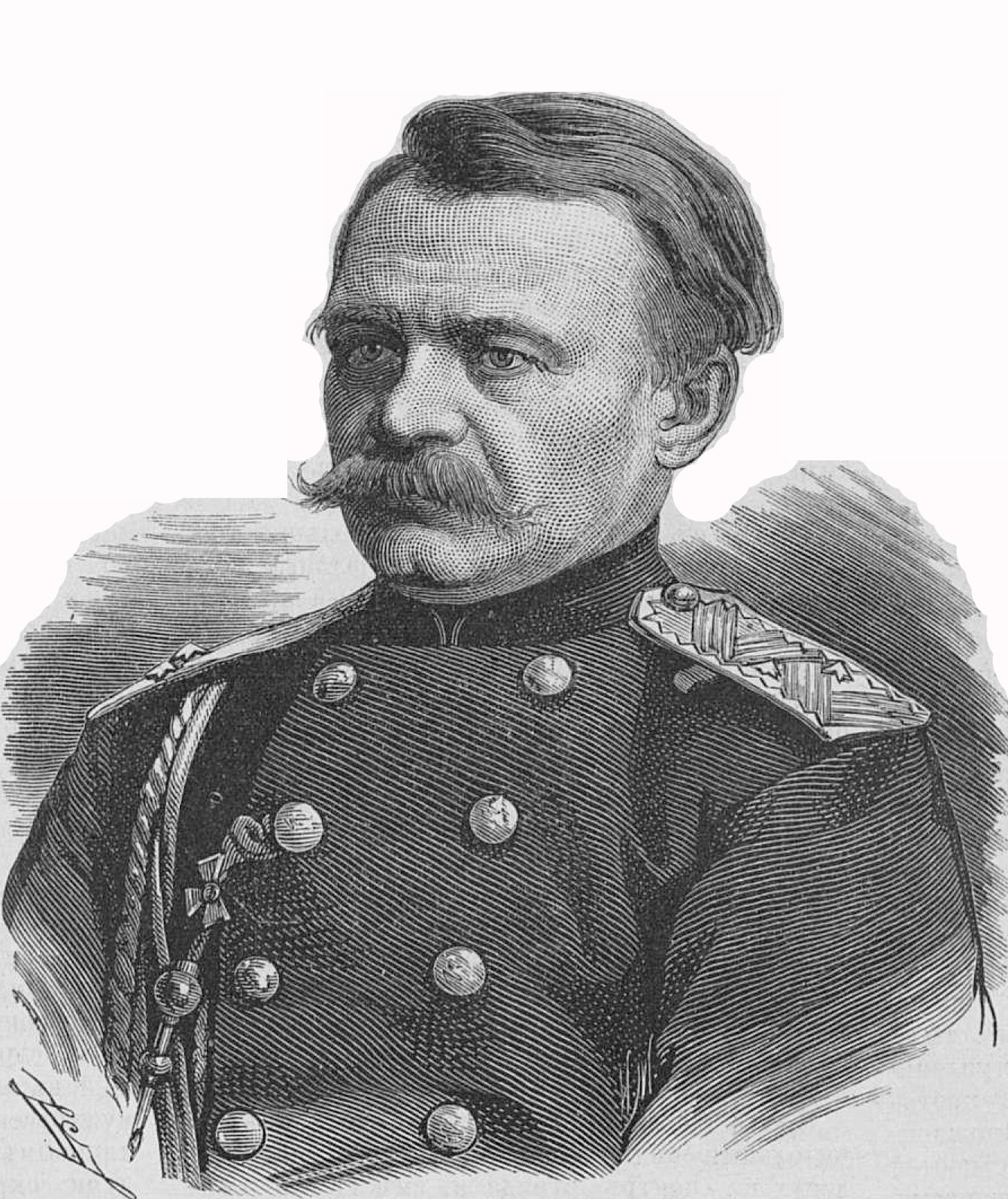 Генерал-майор Столетов Николай Григорьевич, 1877 год